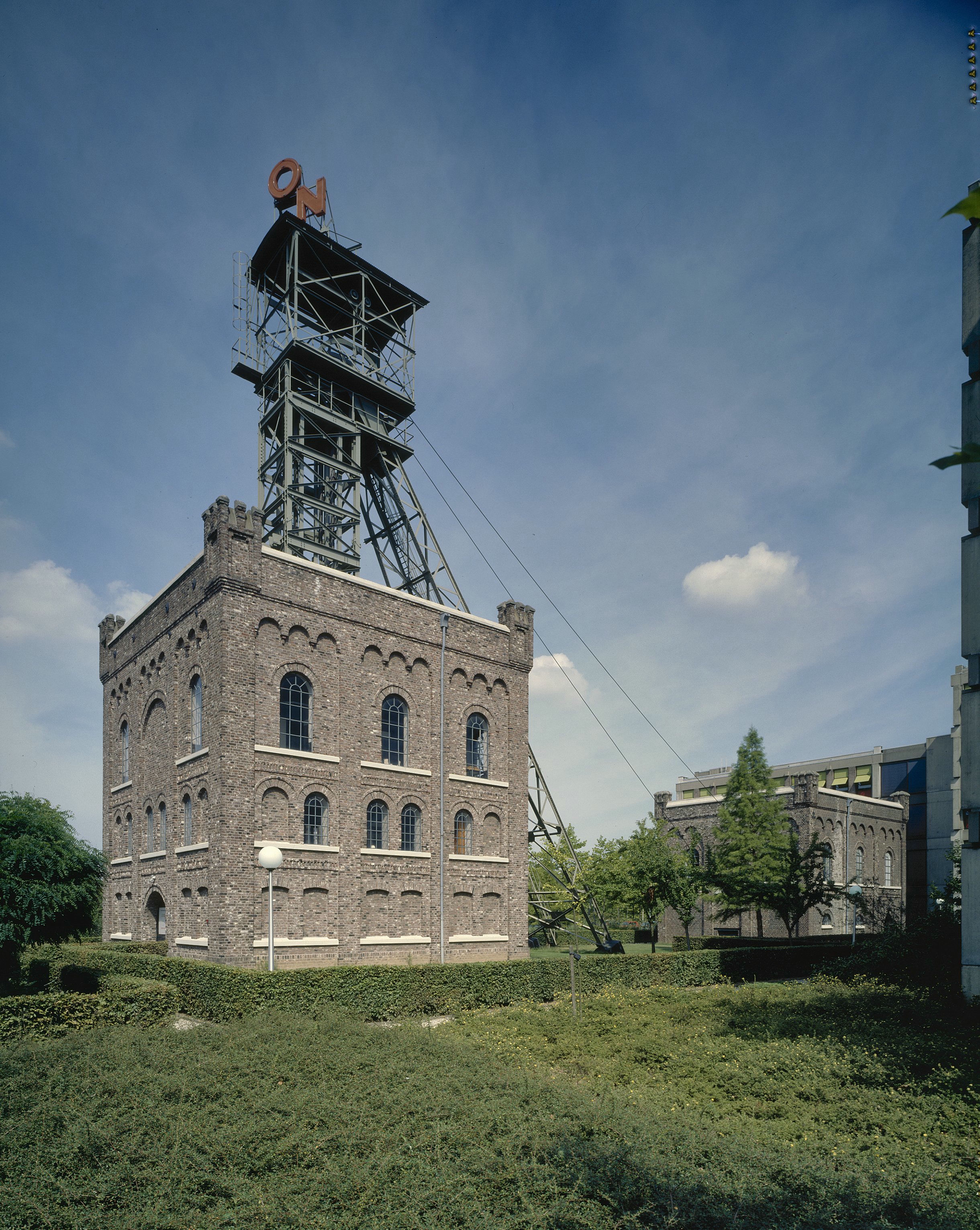 Oranje-Nassaumijn I: Overzicht schachtgebouw van schacht I (opmerking: Gefotografeerd voor Monumenten In Nederland Limburg)